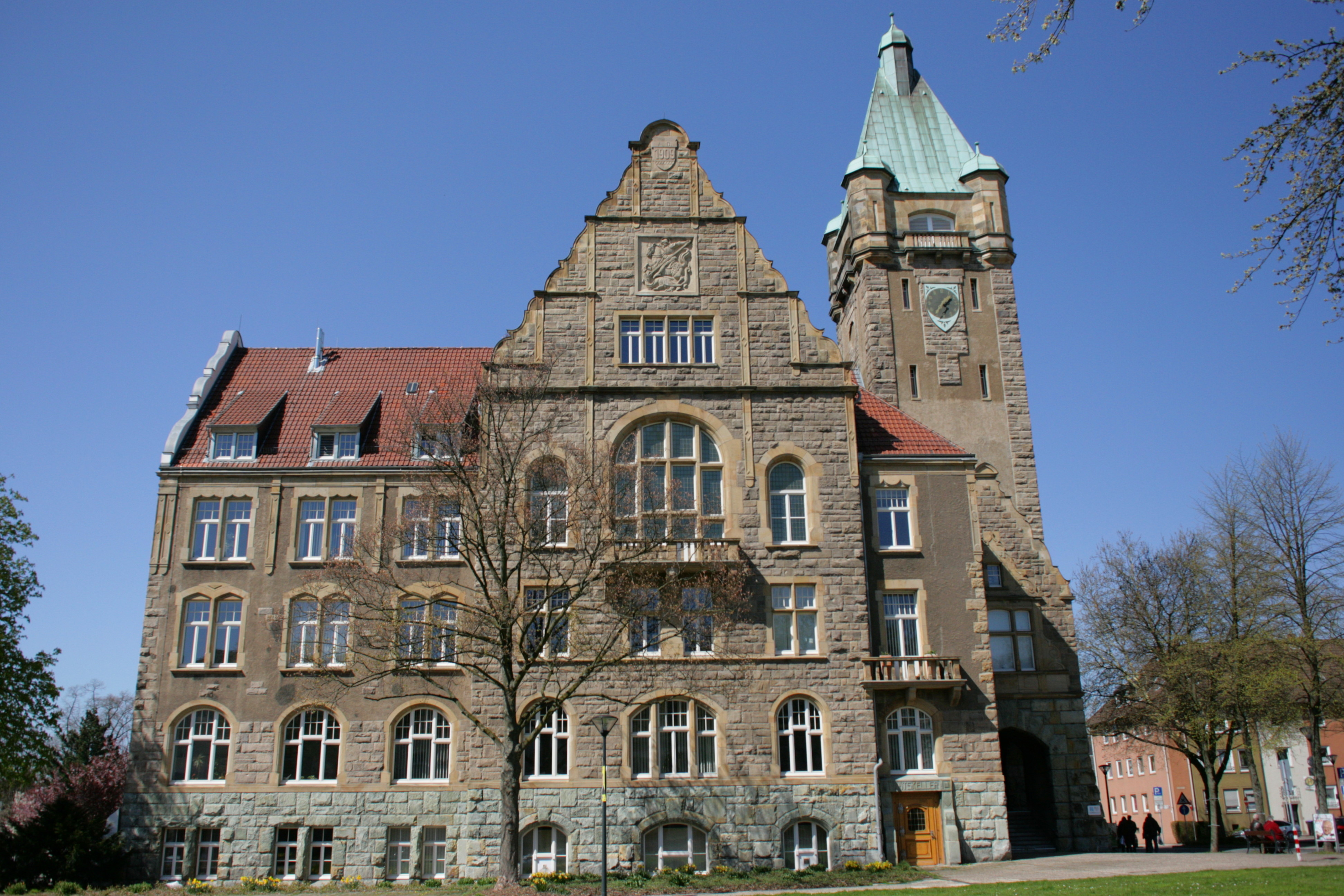 Rathaus am Rathausplatz in Hattingen